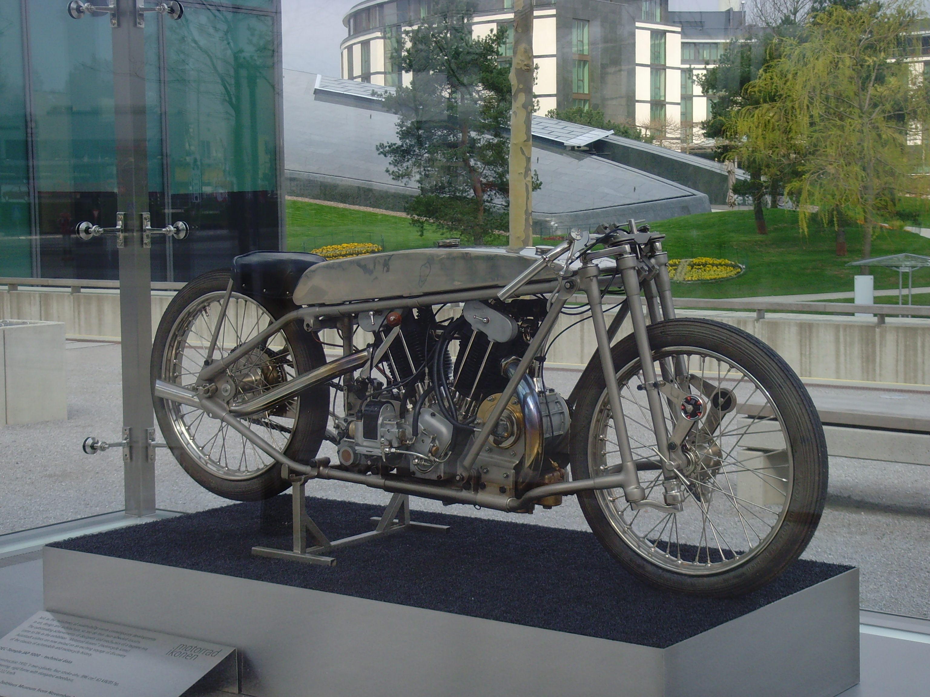 Autostadt Wolfsburg - motorrad ikonen - JAP 2